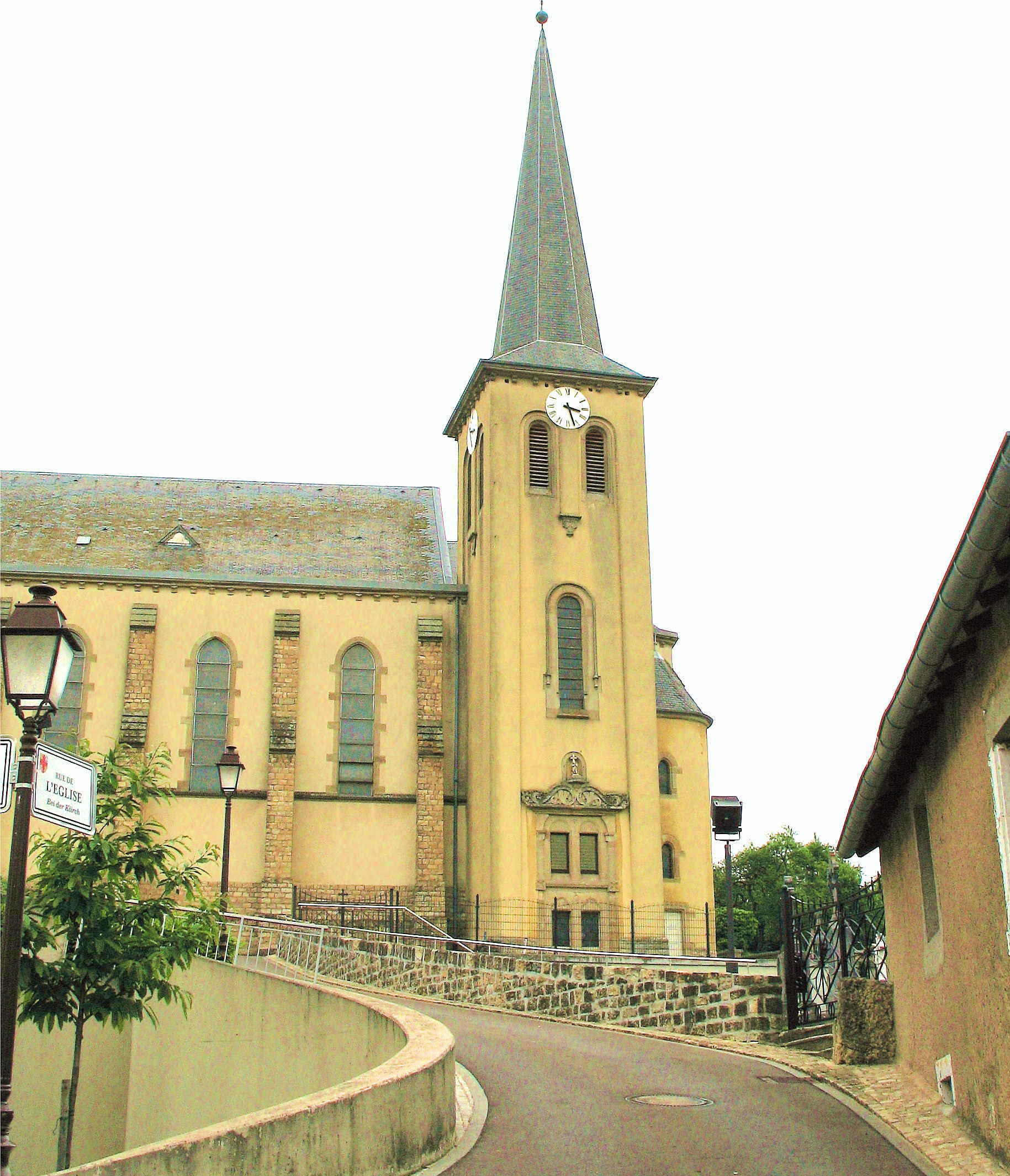 Kierch vu Kanech